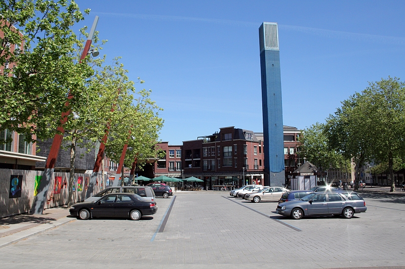 Raadhuisplein in Panningen, The Netherlands, with it's characteristic tower. Raadhuisplein in Panningen (L.), met de kenmerkende toren